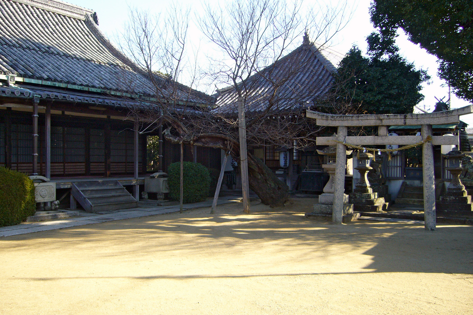 Ojoin in Sennan, Osaka, Japan